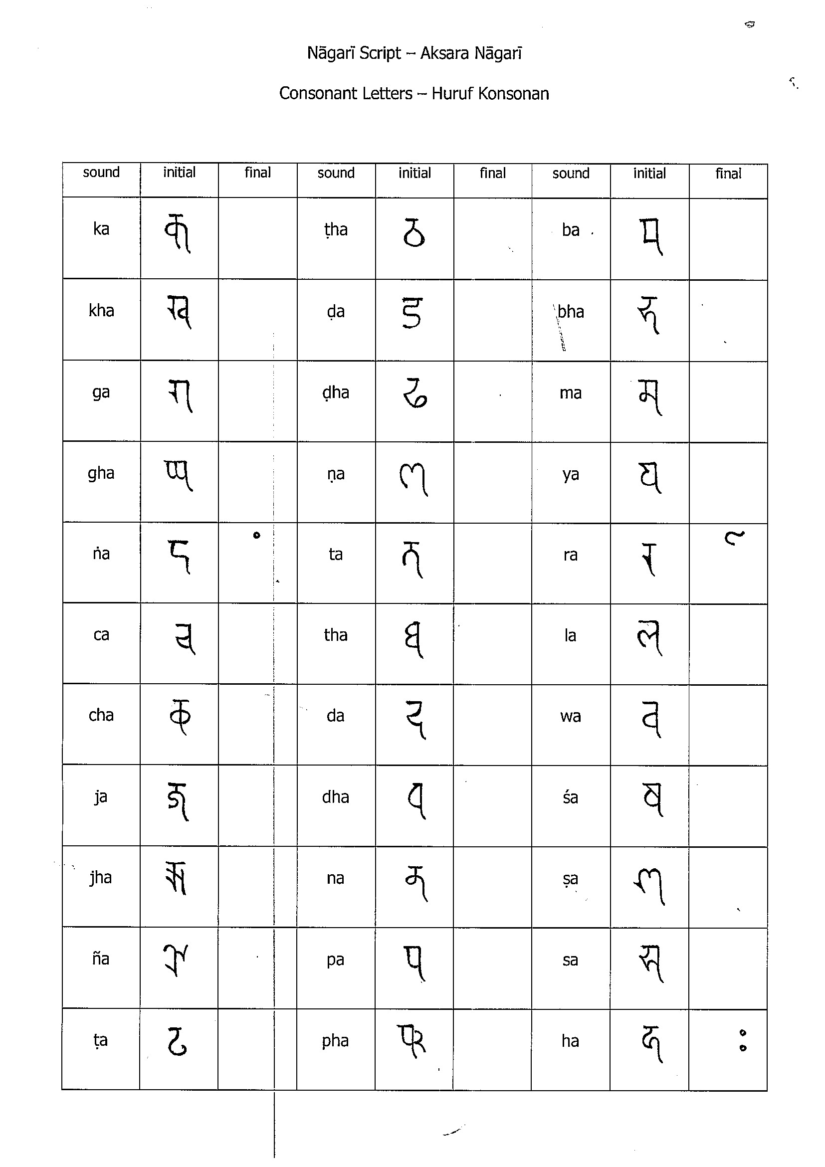 Tabel huruf-huruf konsonan Aksara Nagari.